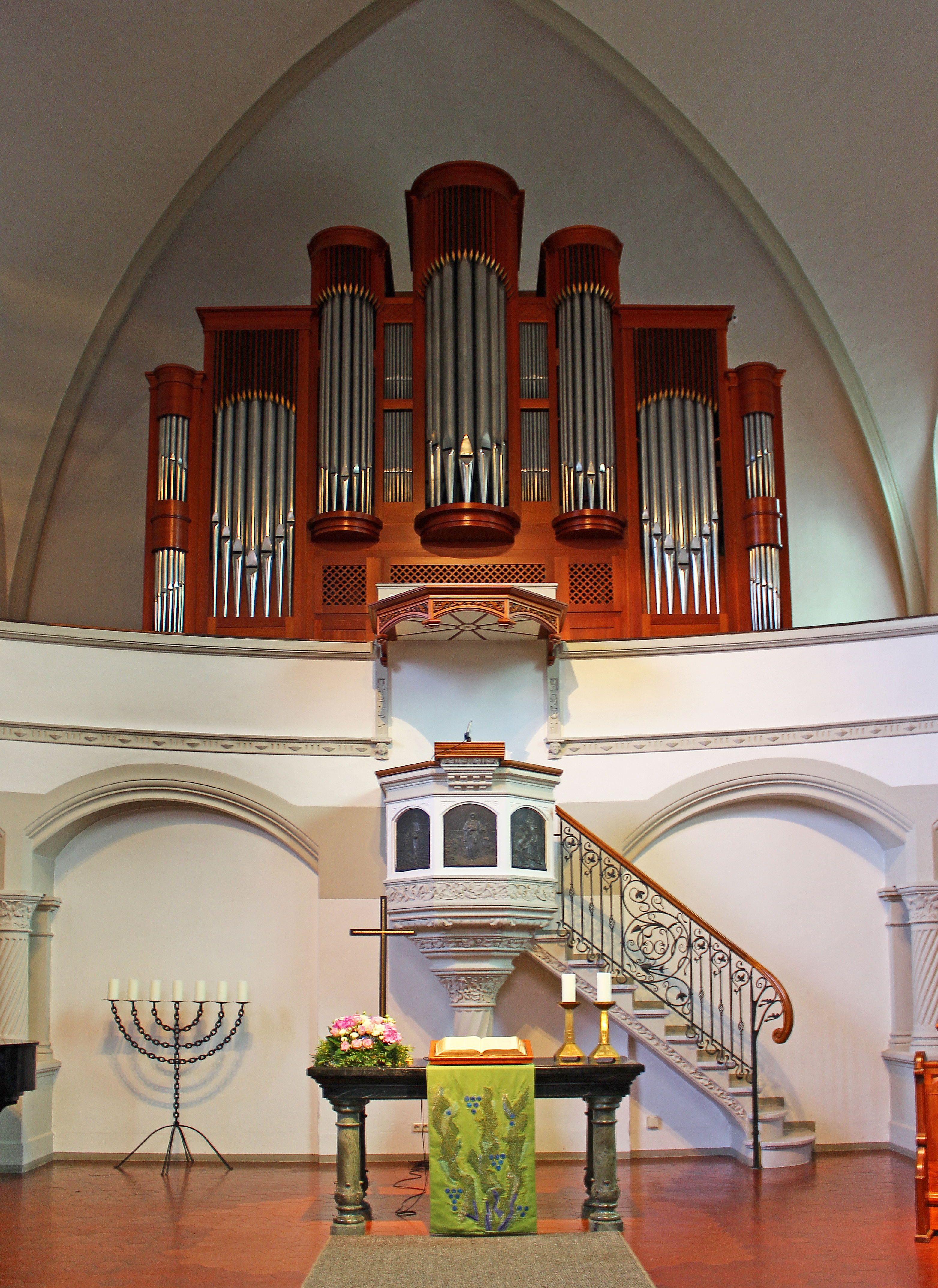 Blick ins Innere der evangelischen Kirche in Saarlouis, Saarland